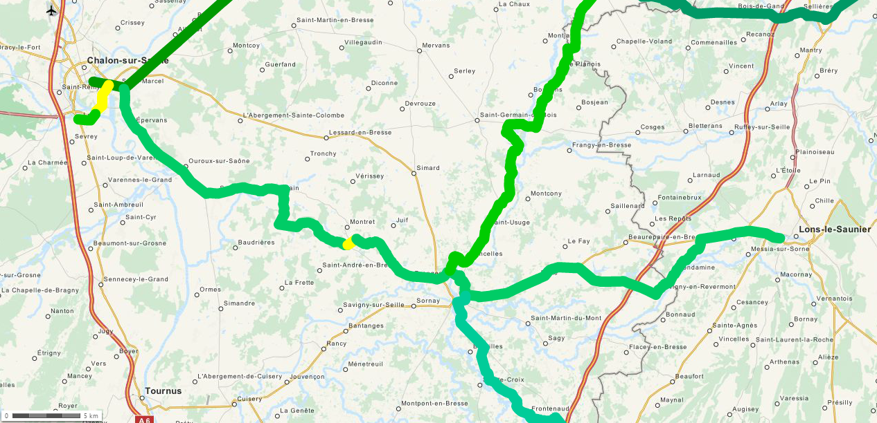 Karte der Römerstrasse von Chalon-sur-Saône nach Lons-le-Saunier Carte de la voie romaine de Chalon-sur-Saône à Lons-le-Saunier This map may be incomplete, and may contain errors. Don't rely solely on it for navigation.